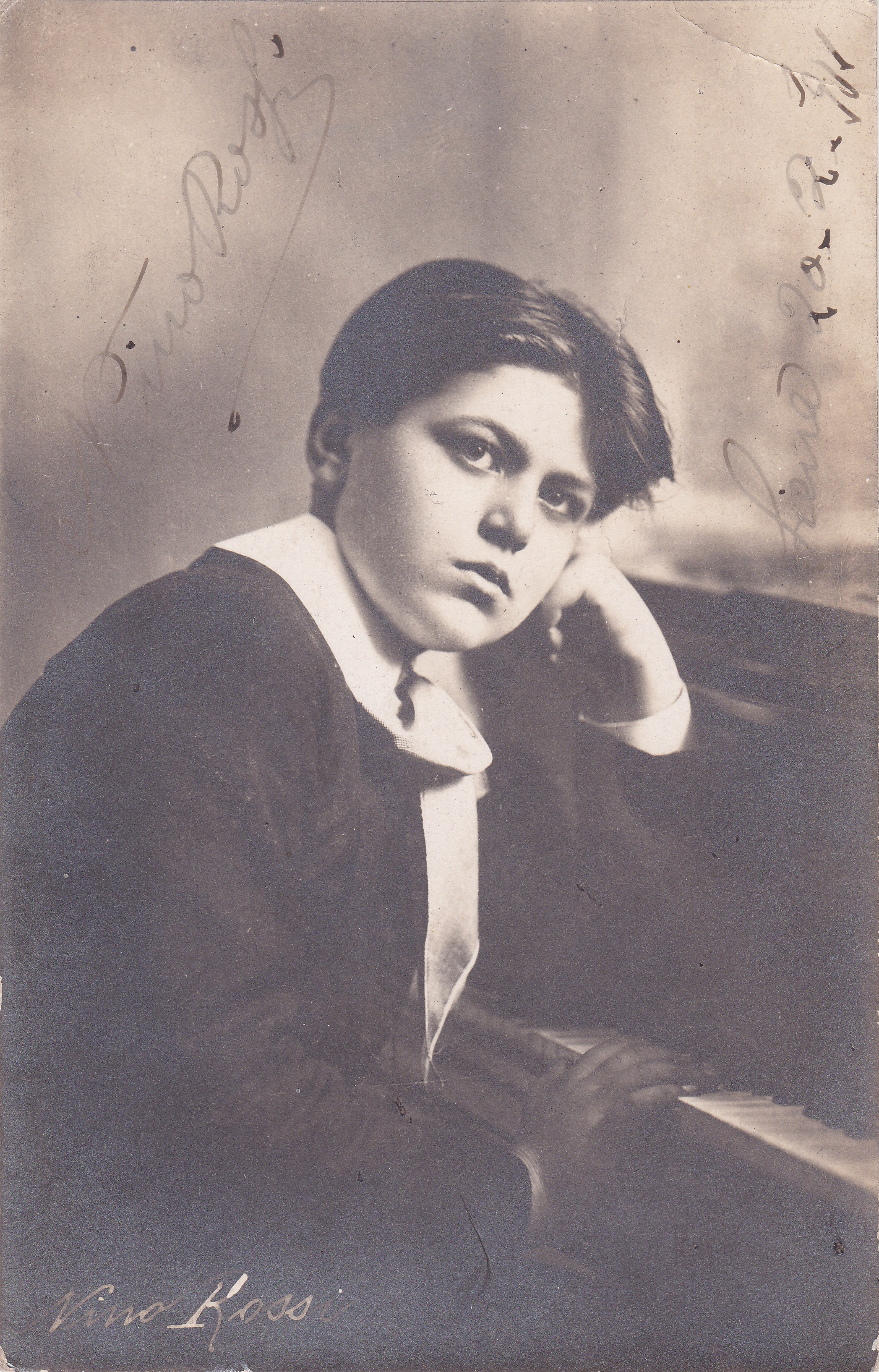 Autore: Bruno Biondi Fonte: Foto di proprietà di Bruno Biondi, scansionata da Bruno Biondi in data 17-12-2015 Descrizione: Foto del pianista italiano Nino Rossi bambino, scattata a Siena il 20 febbraio 1911 Licenza: Io, detentore del copyright su quest'opera, la pubblico nel pubblico dominio